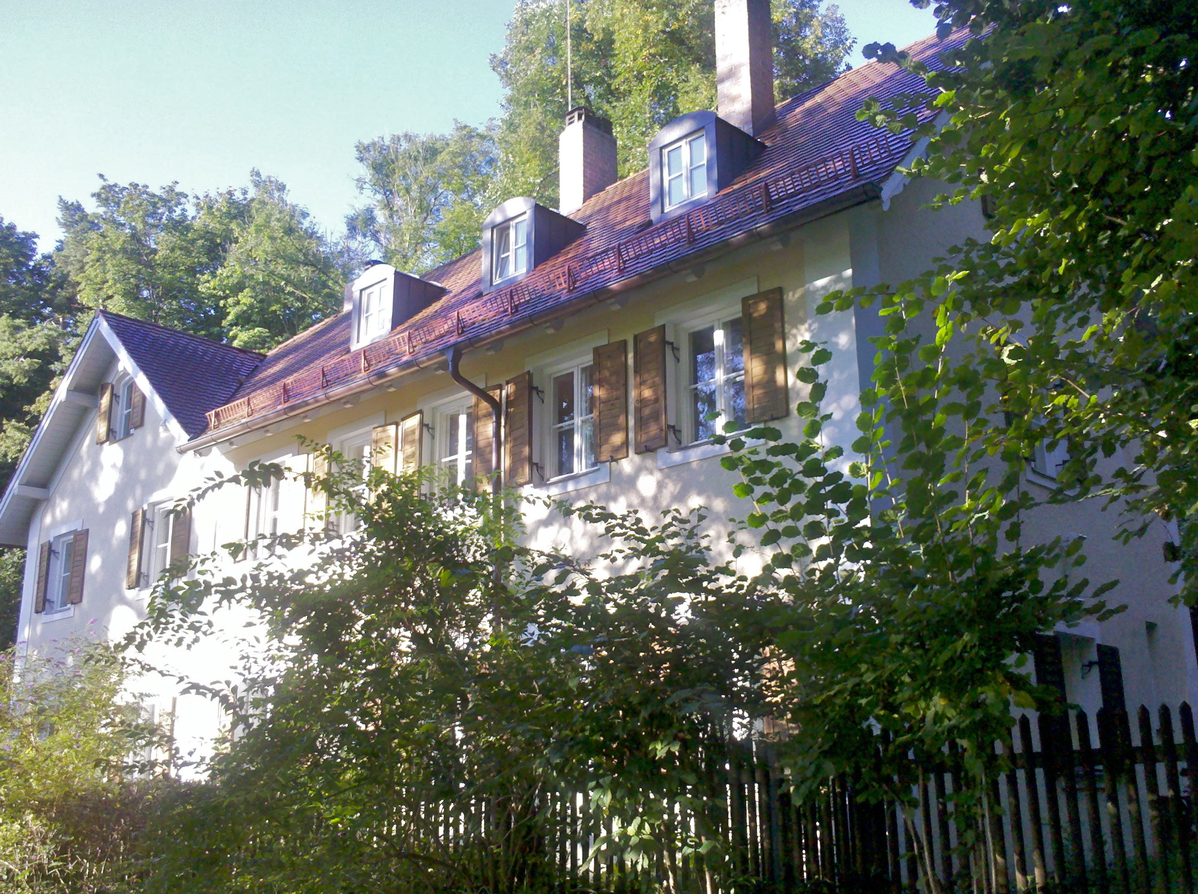 Ansicht der Hoeckhstraße 44 in München. (Vorstadthaus, in Hanglage, 3. Viertel 19. Jh.)This is a photograph of an architectural monument.